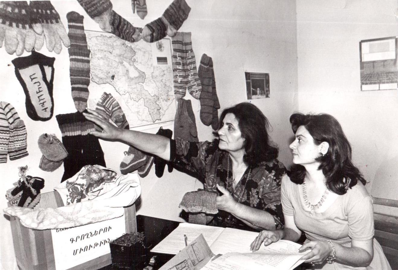 Մետաքսեն դստեր՝ Լիլիթի հետ